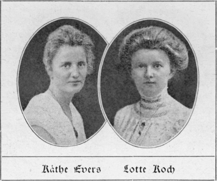 Käthe Evers (1893–1918): Porträt (links), Lotte Koch (rechts)